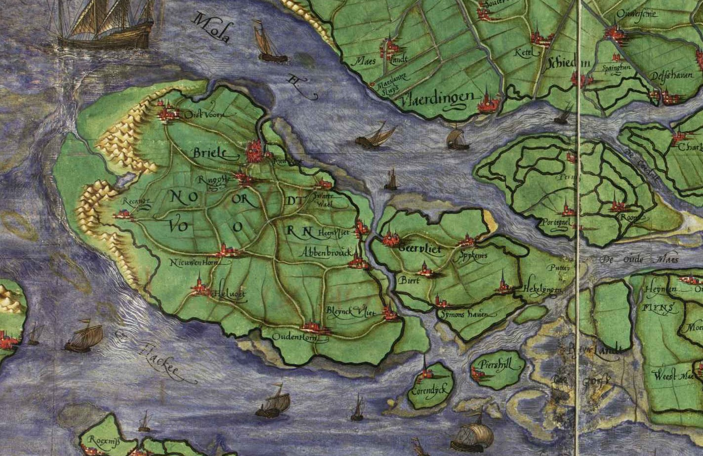 Kaart van Voorne-Putten uit 1573 door Christian Sgrooten. Midden-links op de kaart ligt het eiland Voorne (met o.a. duinen, Oostvoorne, Briele, Nieuwen Horn, Helvoet, Ouden Horn, Heenvliet en Abbenbrouck), rechts daarvan ligt het eiland Putten (met Geervliet, Biert, Spijkenis, Symons haven en Hekelingen). Goed te zien is, dat ten oosten van Hekelingen, buiten de (zwarte) dijken, het voormalige dorp Putten staat aangegeven. Later zou deze oostelijke punt weer bedijkt worden en hernoemd worden naar Wolvenpolder (in de uiterste punt) en Oude en Nieuwe Uitslag van Putten.